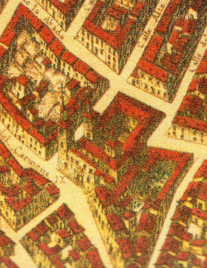 Topografía de la Villa de Madrid descrita por Don Pedro Texeira en 1656, en la cual se demuestran todas las calles al largo y ancho de cada una de ellas, las rinconadas y lo que tuercen las Plazas, fuentes, jardines y huertas con la disposición que tienen las parroquias, Monasterios y Hospitales están señalados sus nombres con letras y números que se hallaran en la tabla y los demás edificios, torres y delanteras de las casas de la parte que mira al Mediodía están sacadas al natural que se podrán tocar las puertas y ventanas de cada una de ellas.